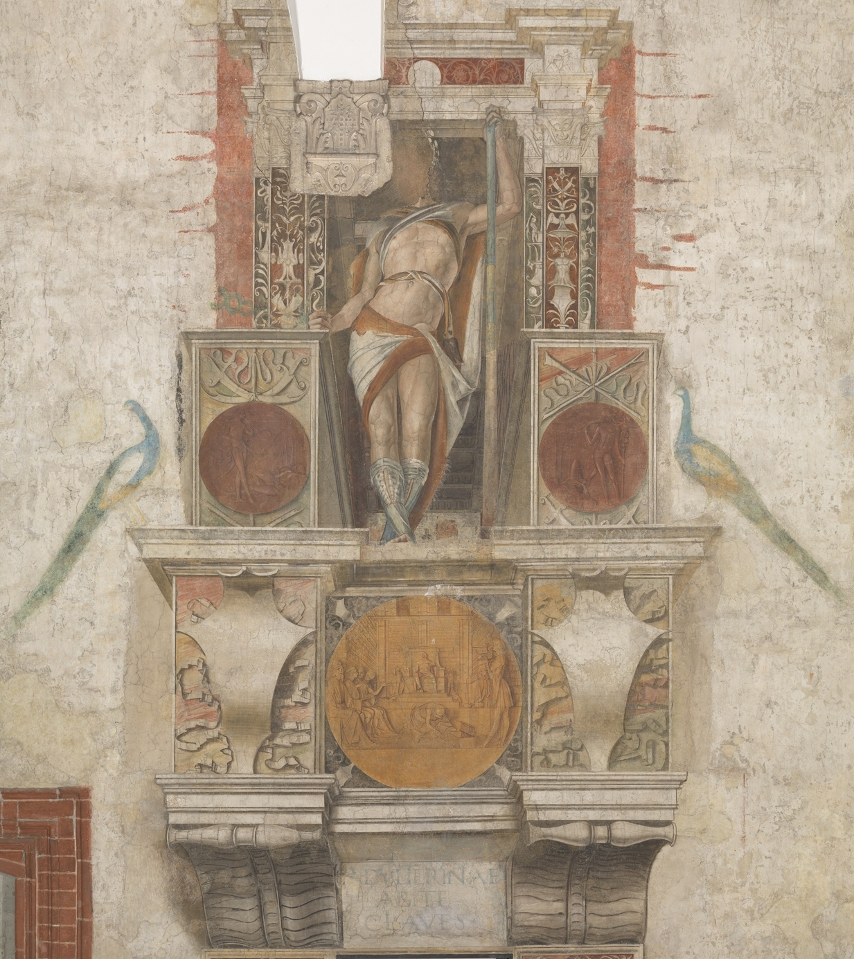 Bramantino, Argo, Milano, Castello sforzesco, sala del tesoro